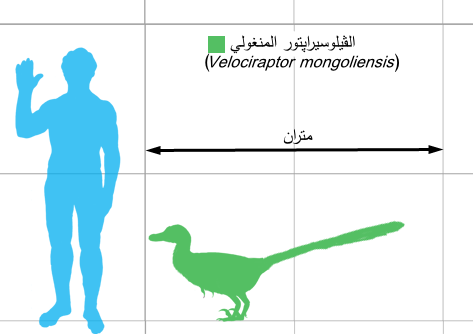 مقارنة بين حجم الفيلوسيرابتور والإنسان. كل مقطع من الشبكة يُمثل مترًا مربعًا.' بناءً على رسم بريشة مات مارتينوك.